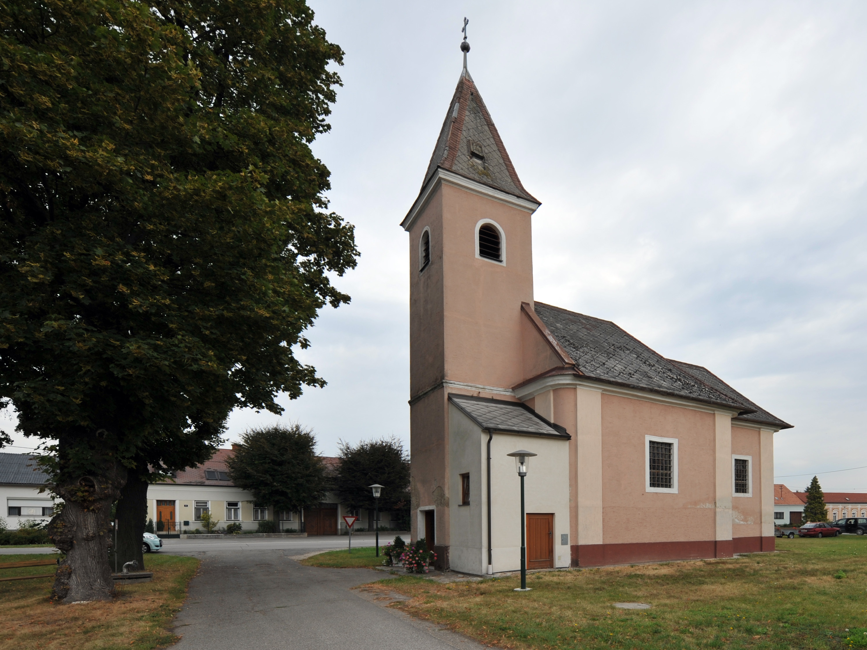 Kath. Filialkirche hl. Rosalia